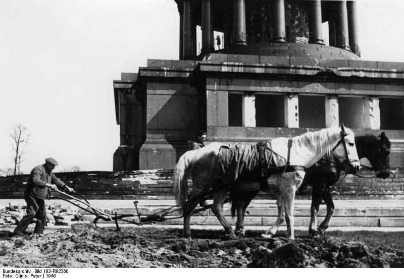 Berlin, Siegessäule, Pflügen der Grünfäche Illus- Peter Cürlis Brachlandaktion an der Siegessäule in Berlin [1946] 219-46 [Berlin.- Mann mit Pflug hinter zwei Pferden beim Pflügen vor der beschädigten Siegessäule]